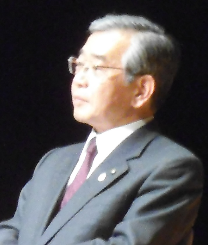 島根県知事溝口善兵衛氏。2012年11月に東京の明治大学で開催された古事記編纂1300年シンポジウムで撮影。